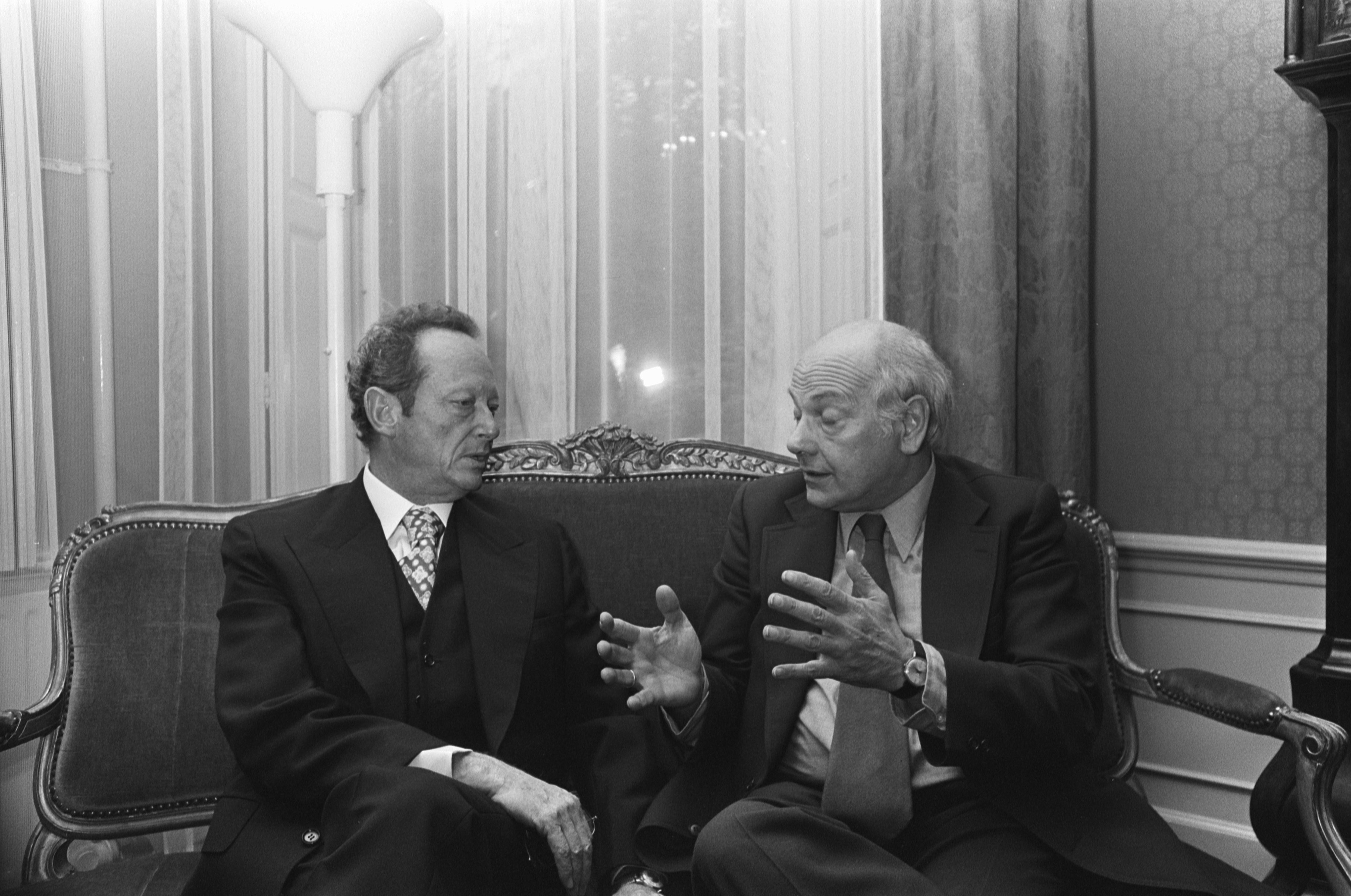 Israelische minister (Buitenlandse Zaken) Allon (links) bij premier Den Uyl.